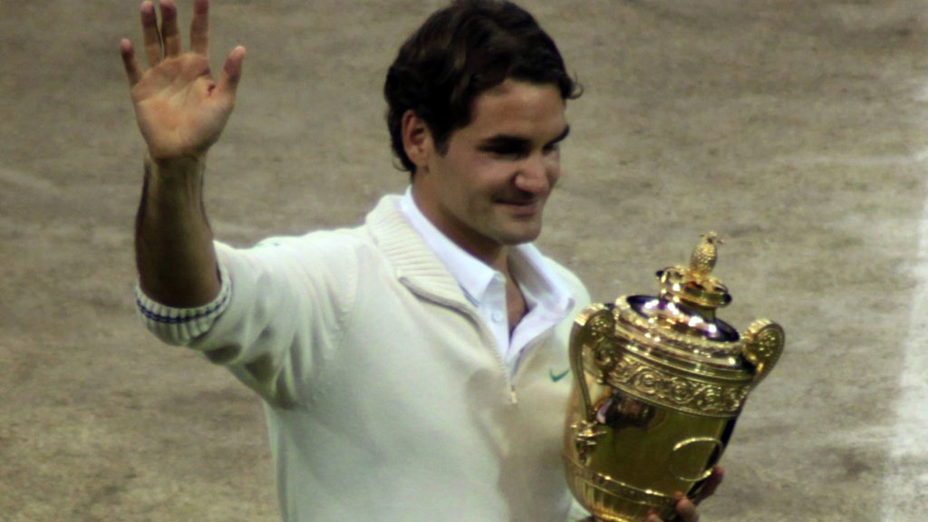 Roger Federer, Winner, Centre Court, Wimbledon 2012. (08/07/2012)